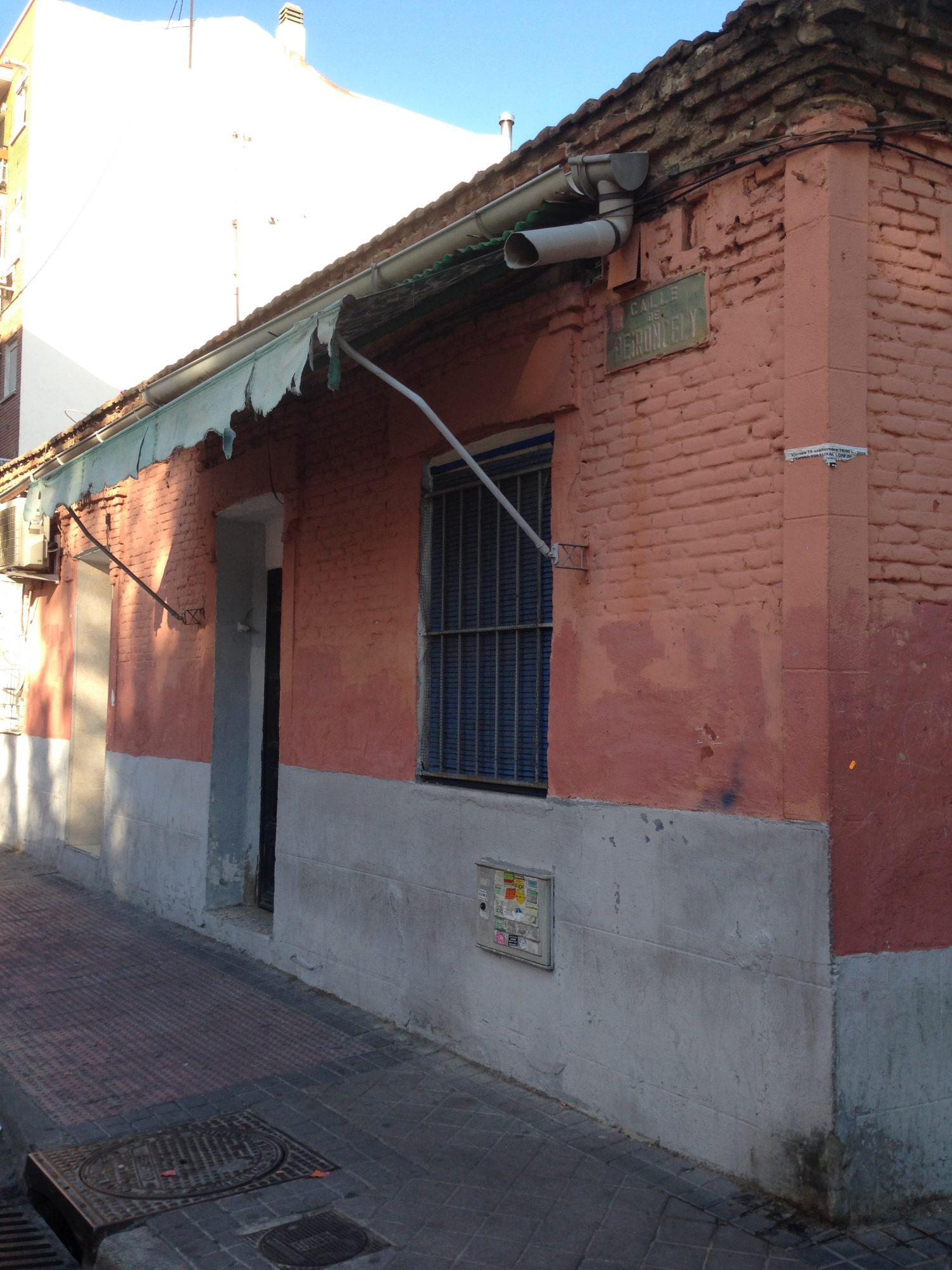 El conjunto arquitectónico de viviendas situado en el número 10 de la calle Peironcelly , en el barrio de Entrevías y el pasado que encierra entre sus muros, son desconocidos para la inmensa mayoría de los madrileños. El edificio, bombardeado durante la Guerra Civil, fue fotografiado por Robert Capa, convirtiéndose en un símbolo de la barbarie de la Guerra. En la sesión del Pleno del Ayuntamiento de Madrid, celebrado el día 20 de julio, se ha llegado a un acuerdo de incluirle en el catálogo de bienes y espacios protegidos, adquirir el terreno y dar solución a los problemas de habitabilidad de las familias que residen en ese edificio.